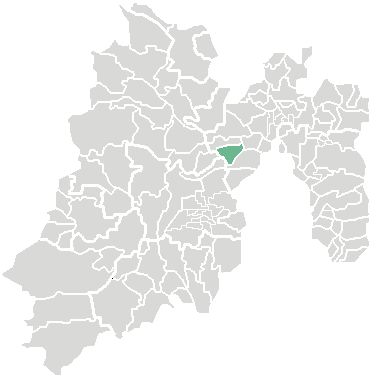 Es la ubicacion fgeografica de jilotzingo